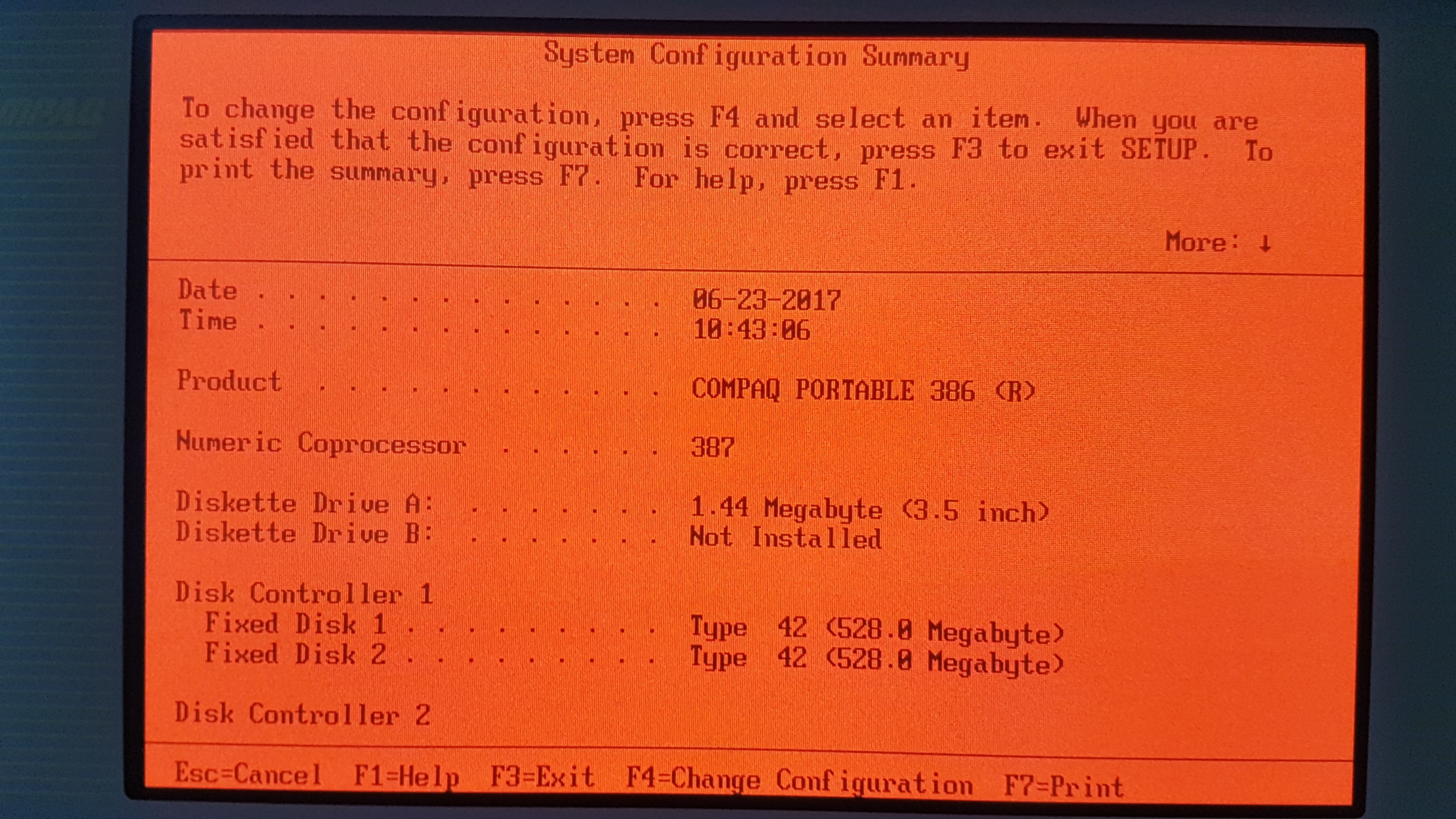 Compaq Portable 386 BIOS